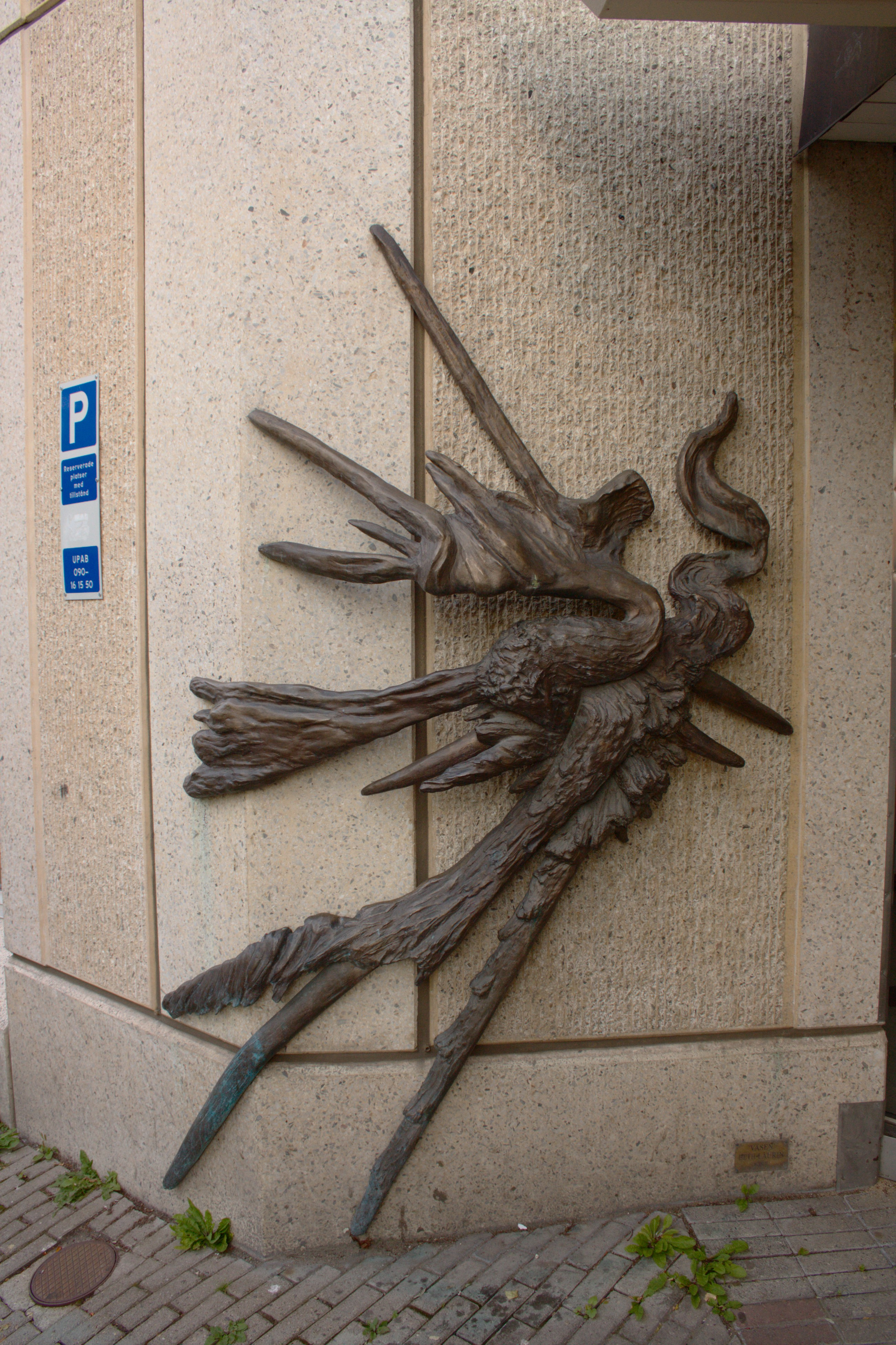 Konstverk i brons på väggen till Folkets Hus av Beth Laurin. Gjuten i brons på Bergmans Konstgjuteri i Stockholm och invigd 1987